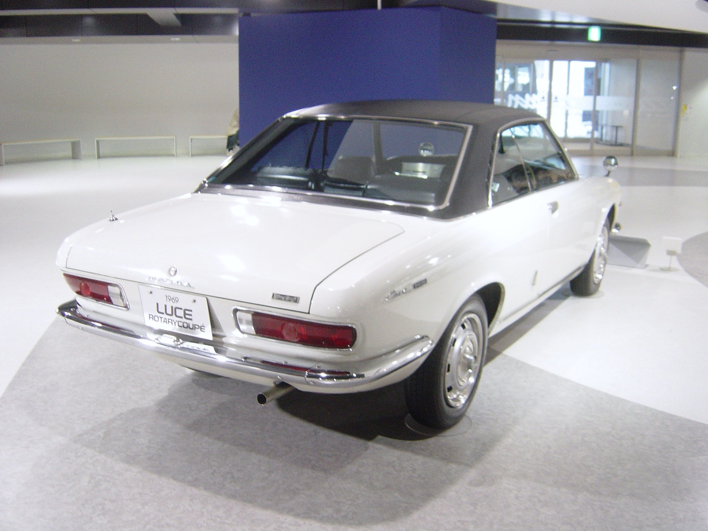 Mazda Luce(マツダ・ルーチェ),Mazda Museum